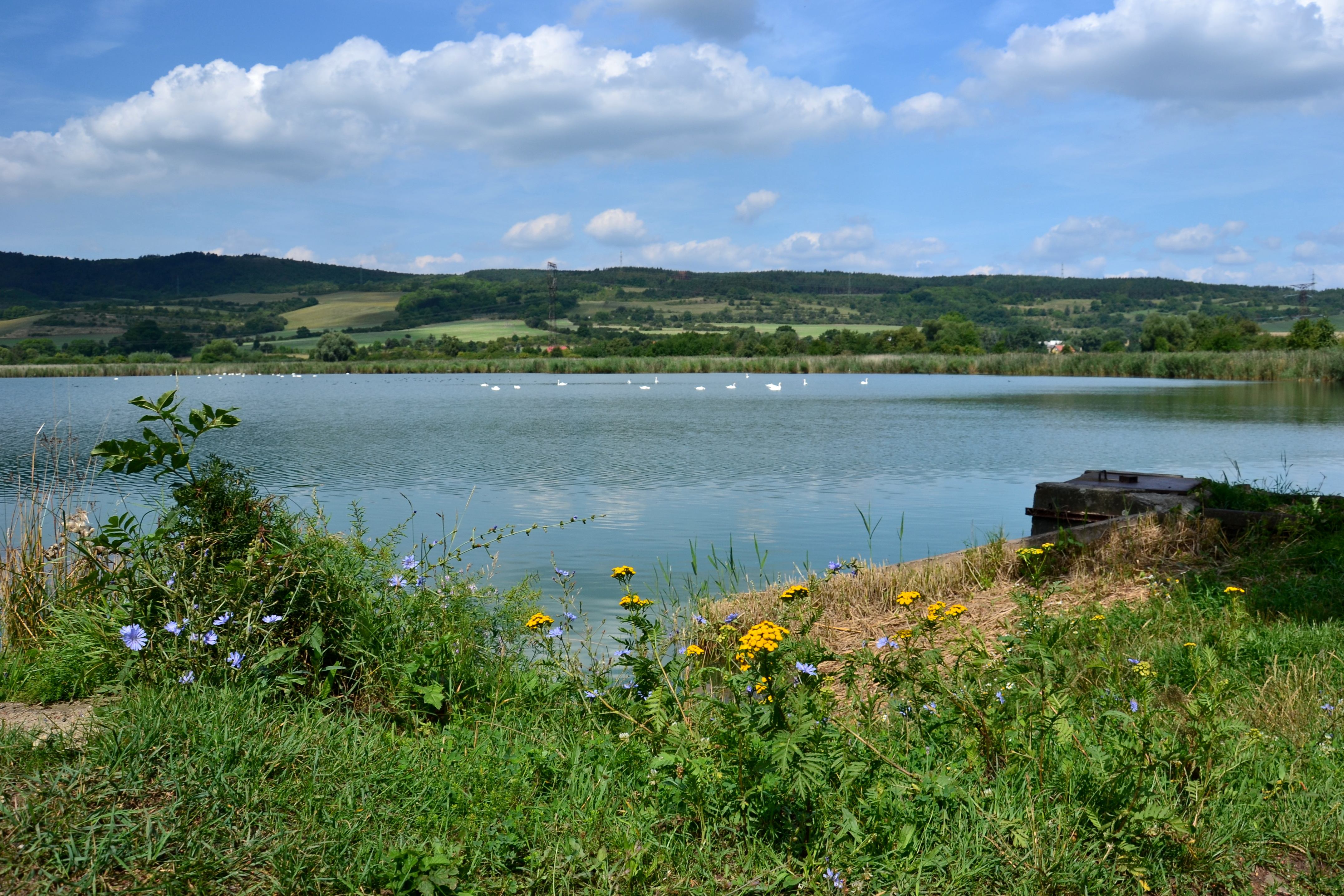 Vinařský rybník z hráze